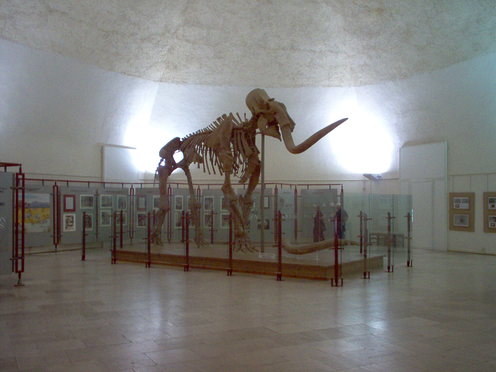 Lo scheletro di un mammuthus meridionalis esposto nel Forte Spagnolo. A seguito dei danni strutturali causati dal terremoto del 2009 il Museo Nazionale d'Abruzzo è stato trasferito in un'altra sede.